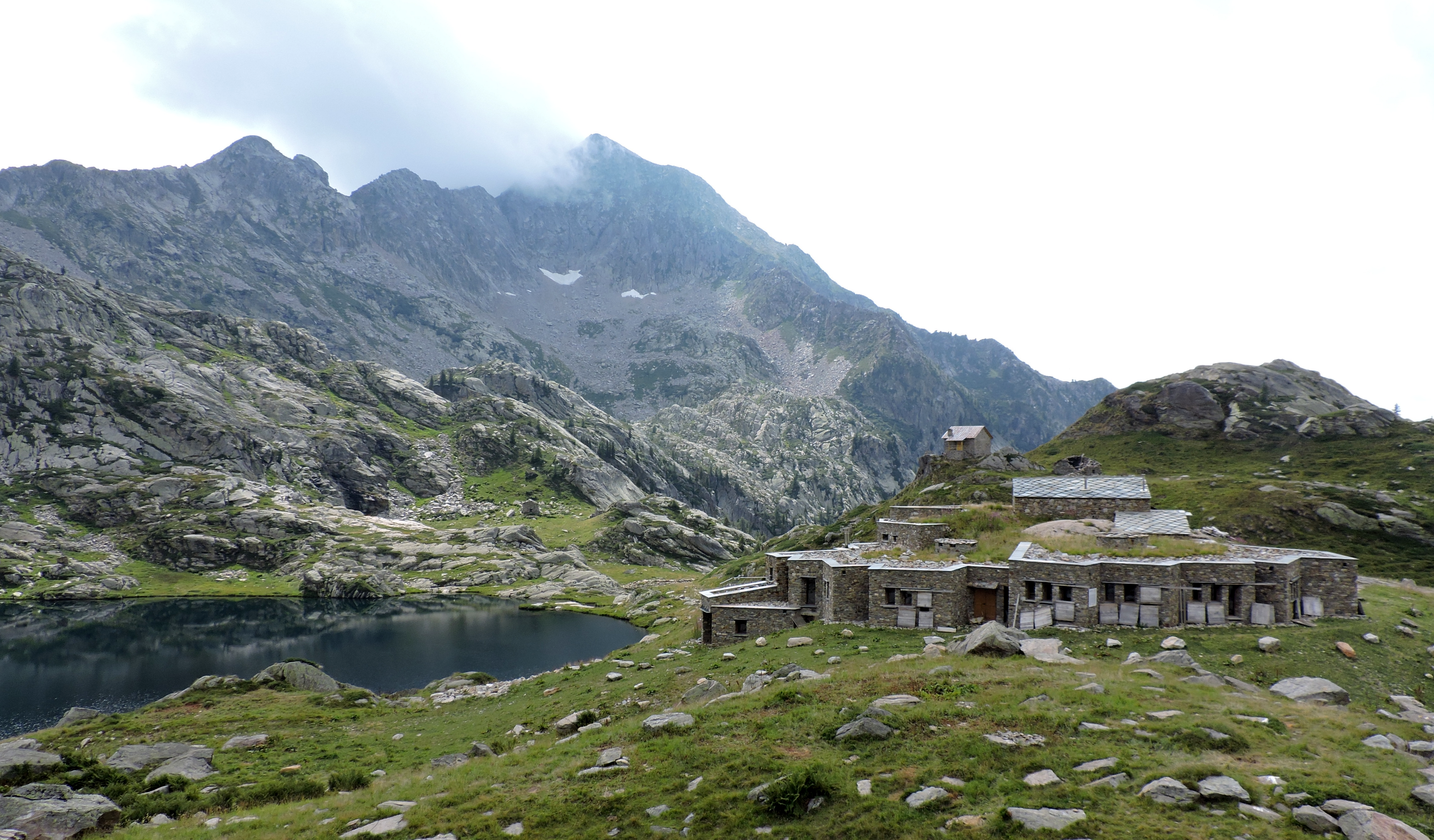 Mont Mars (Q47466367)